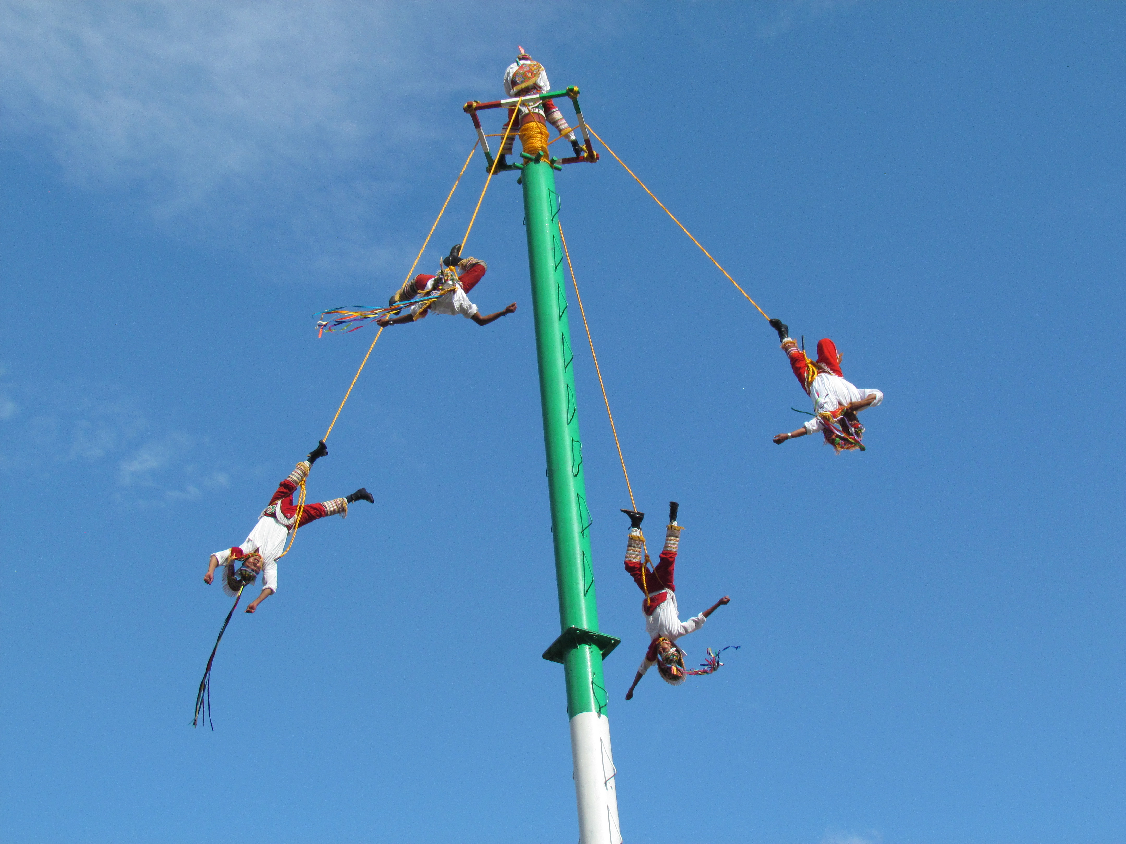 Voladores realizando su ritual en la feria del mole 2014